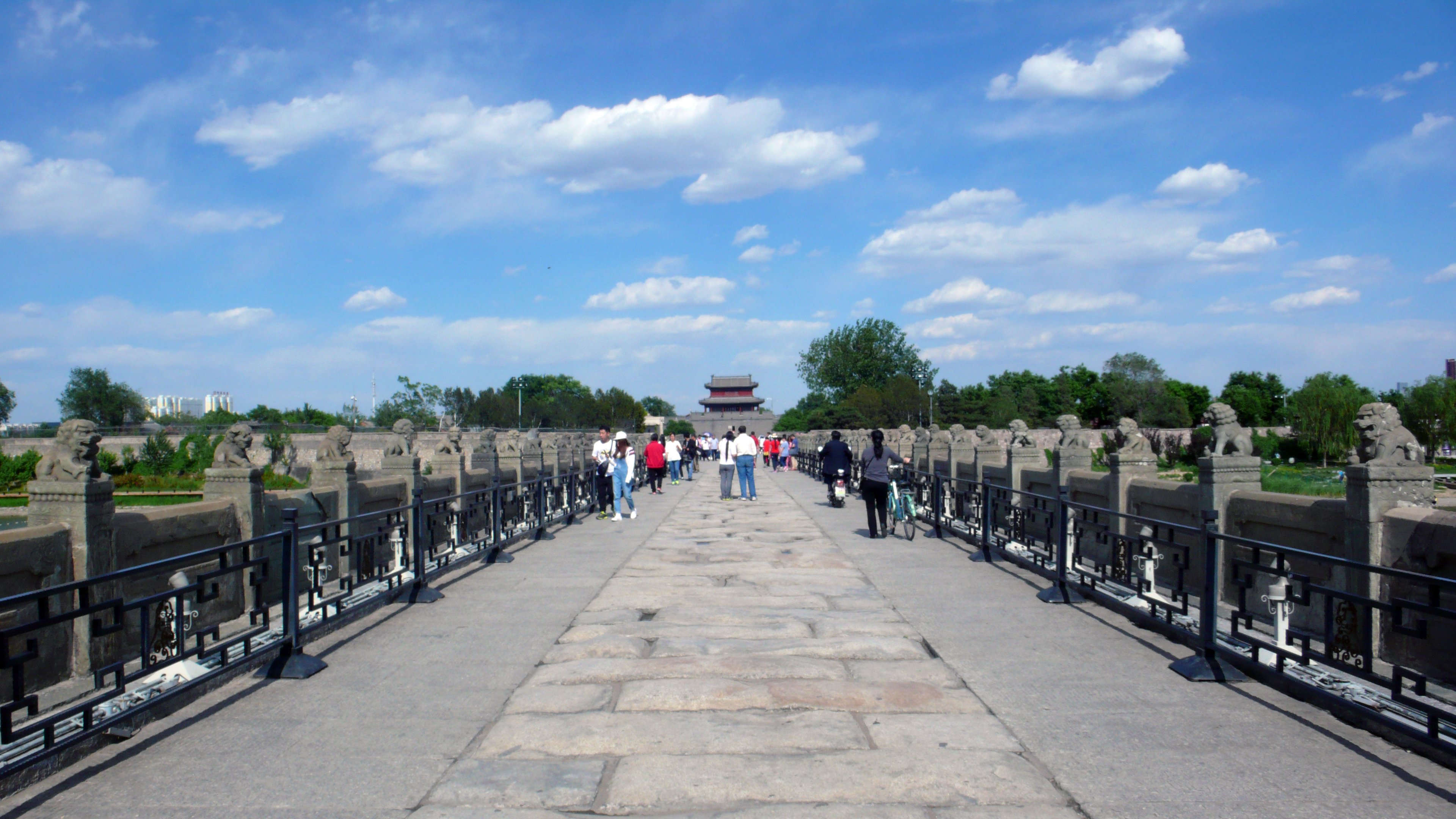 卢沟桥与宛平城门。